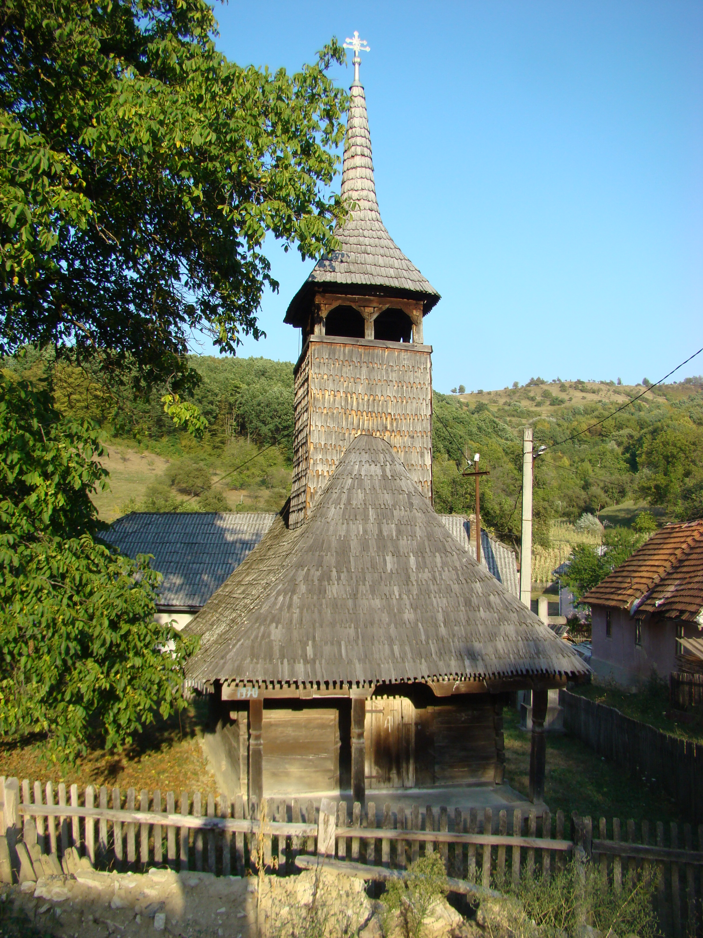 Biserica de lemn "Cuvioasa Paraschiva" , sat STEJERA; comuna MIREŞU MARE